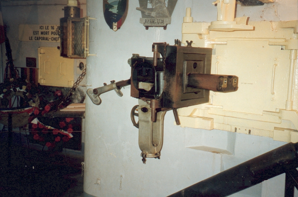 Schweres Zwillingsmaschinengewehr, Kasematte Marckolsheim-Süd, Maginot-Linie